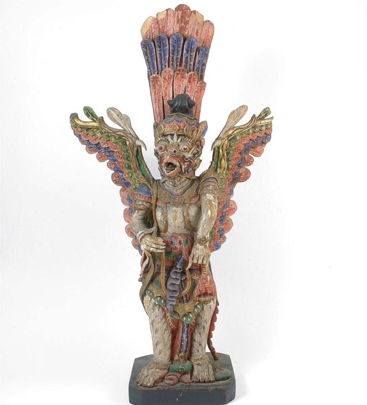 Beeld. Garuda, het rijdier van Vishnu, wordt als mythisch wezen voorgesteld; half mens, half vogel. Hij is strikt genomen niet van goddelijke oorsprong, toch wordt hij vereerd omdat men hem beschouwd als een krachtig medewerker aan de heldendaden van zijn god. Allerlei verhalen omtrent Garuda's geboorte zijn in omloop. Op Bali wordt Garuda voorgesteld met wang- en slagtanden, klauwvormige uitsteeksels aan de vleugels en met de voet trappend op een slang. Hij vertoont grote overeenkomsten met Rawana's rijdier Wilmana dat ook door een zwaard hanterende vogeldemon wordt voorgesteld. Dit beeld behoort tot een groep van 28 beelden (15-156 t/m 15-182b), gezamenlijk een pantheon van Balinese godheden vormend, dat getoond werd op de Nederlandse koloniale afdeling op de wereldtentoonstelling te Parijs in 1900. Speciaal voor deze tentoonstelling heeft C.M. Pleyte, conservator van 's Rijks Etnografisch Museum in Leiden, deze beelden op Bali laten vervaardigen. Met behulp van enkele priesters selecteerde hij de relevante beelden die vervolgens door Balinese houtsnijders werden nagemaakt.. Houten beeld van Garuda